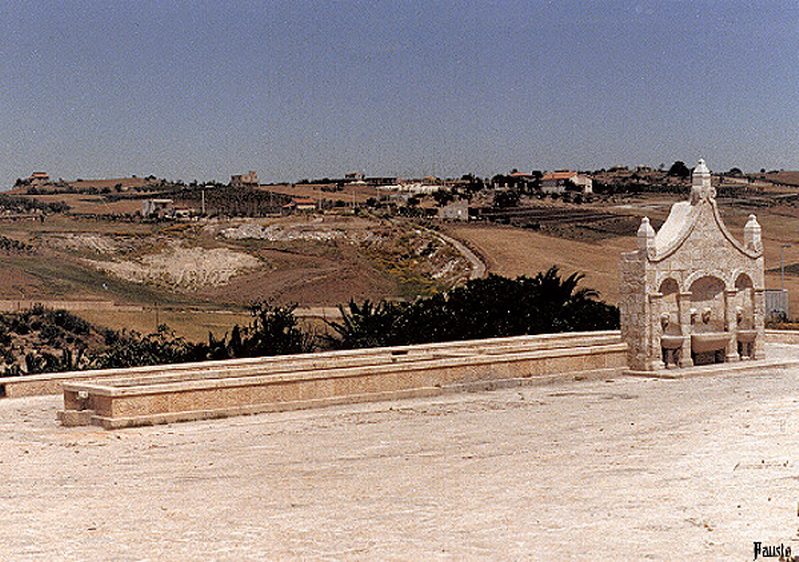 Abbeveratoio "Canale" di Campobello di Licata (Ag)